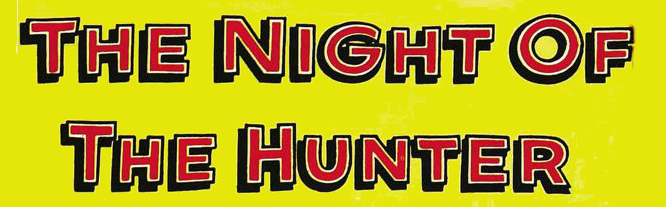 Logo von Die Nacht des Jägers